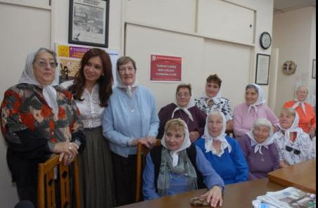 Madres de Plaza de Mayo y Senadora Cristina Fernández de Kirchner. 30 Aniversario de la primera vuelta a pirámide. Foto en sede de Madres de Plaza de Mayo